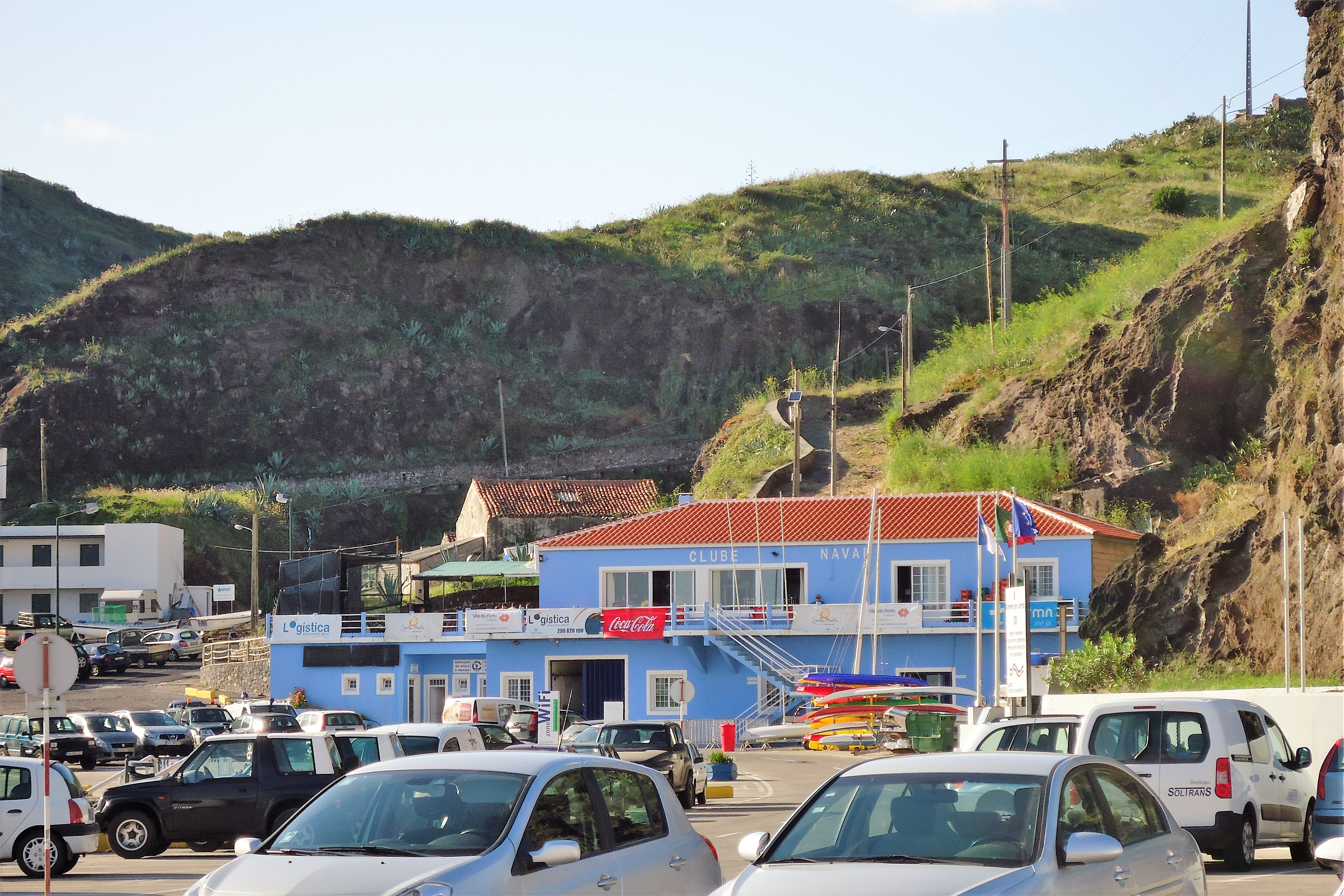 Clube Naval de Santa Maria, Vila do Porto, ilha de Santa Maria, Região Autónoma dos Açores, Portugal.